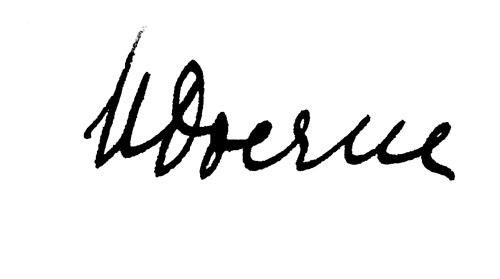 Unterschrift des deutschen lutherischen Theologen Martin Doerne (1900–1970).